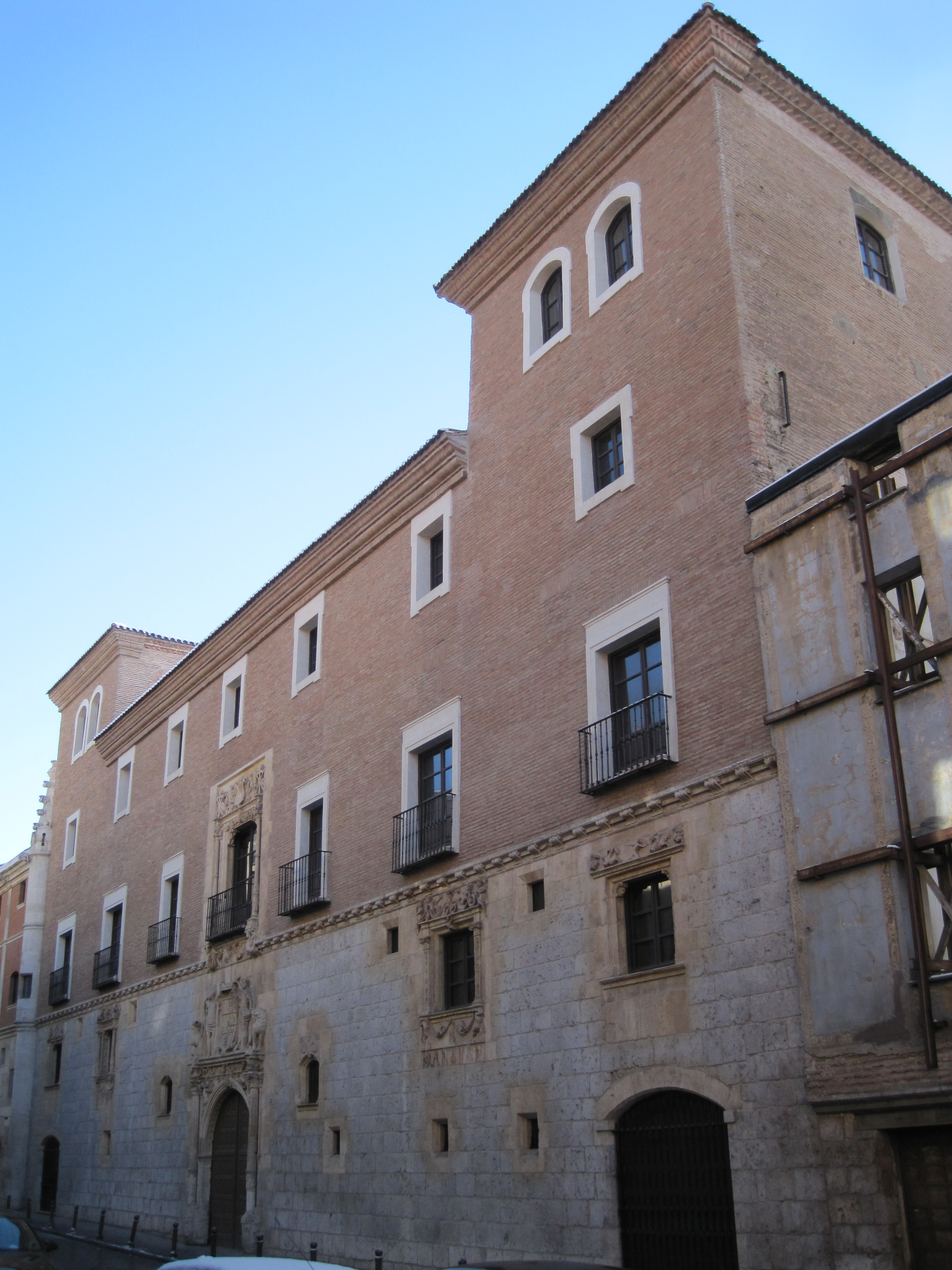 Fachada principal de la casa de Íñigo Angulo, en Burgos.